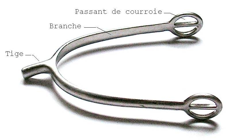 Eperon prince de Galles commenté